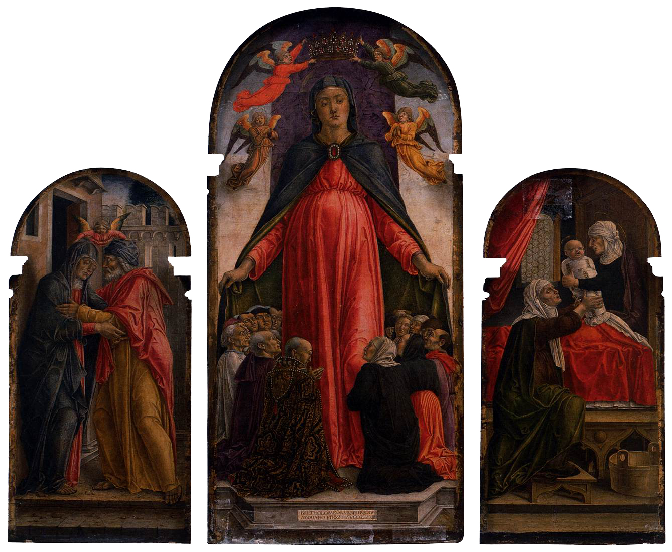 VIVARINI, Bartolomeo Triptych Tempera on panel, 146 x 71 cm (centre), 104 x 50 cm (sides) Santa Maria Formosa, Venice